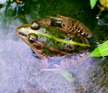 Rana porosa porosa